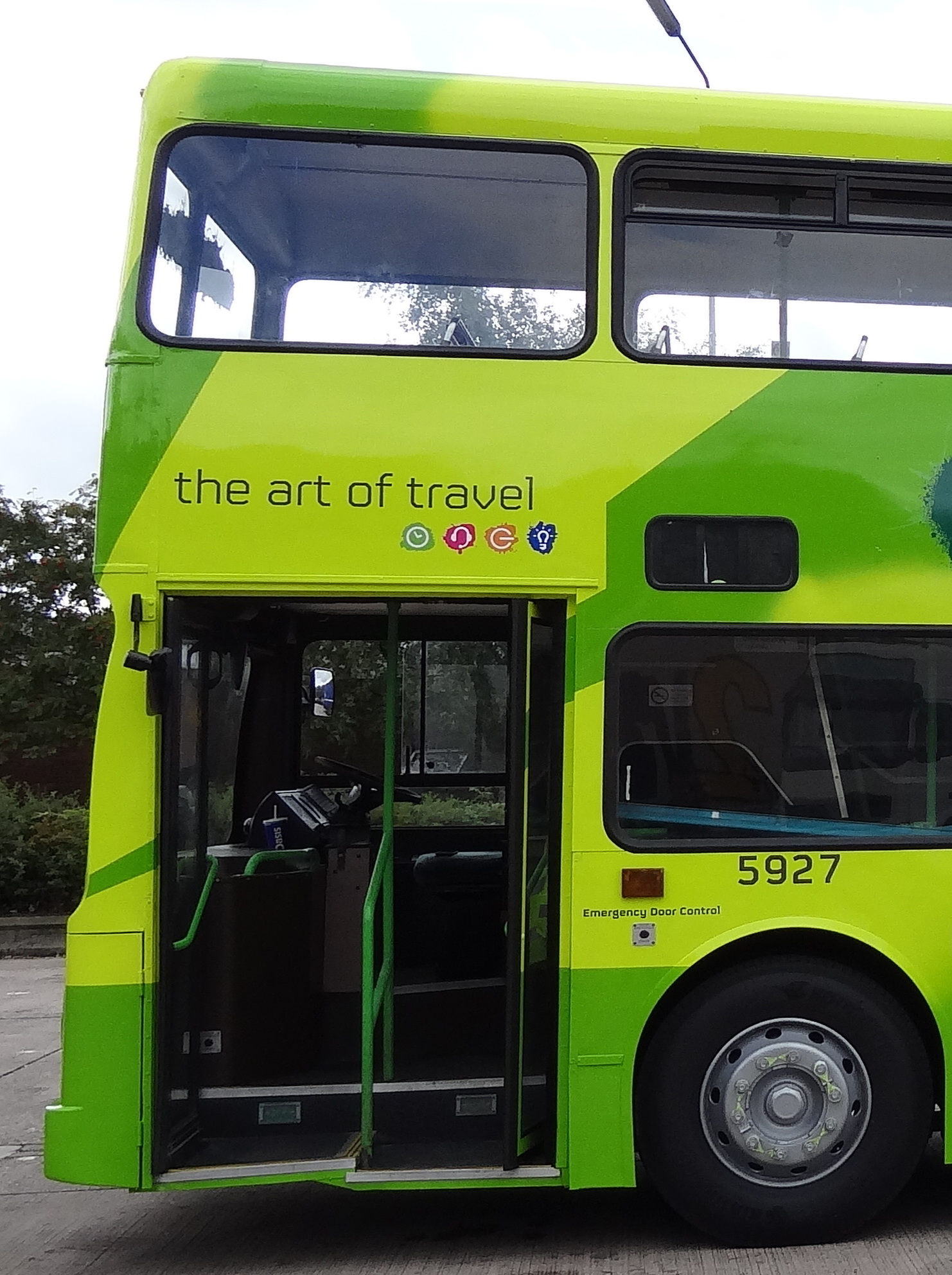 P927MKL 5927